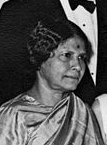 Ausschnitt einer Fotographie, die US-Präsident J. F. Kennedy mit der indischen Delegation beim Staatsbesuch des indischen Präsidenten Dr. Sarvepalli Radhakrishnan zeigt, darunter die indische Außenministerin Lakshmi N. Menon.